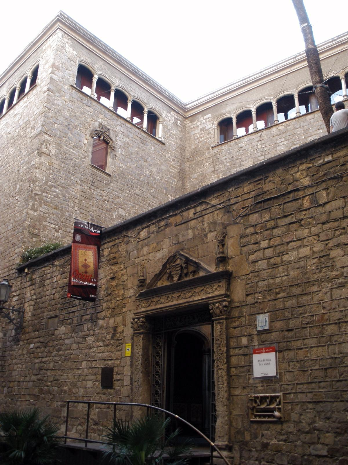 Archivo Histórico de Barcelona (Cataluña, España)